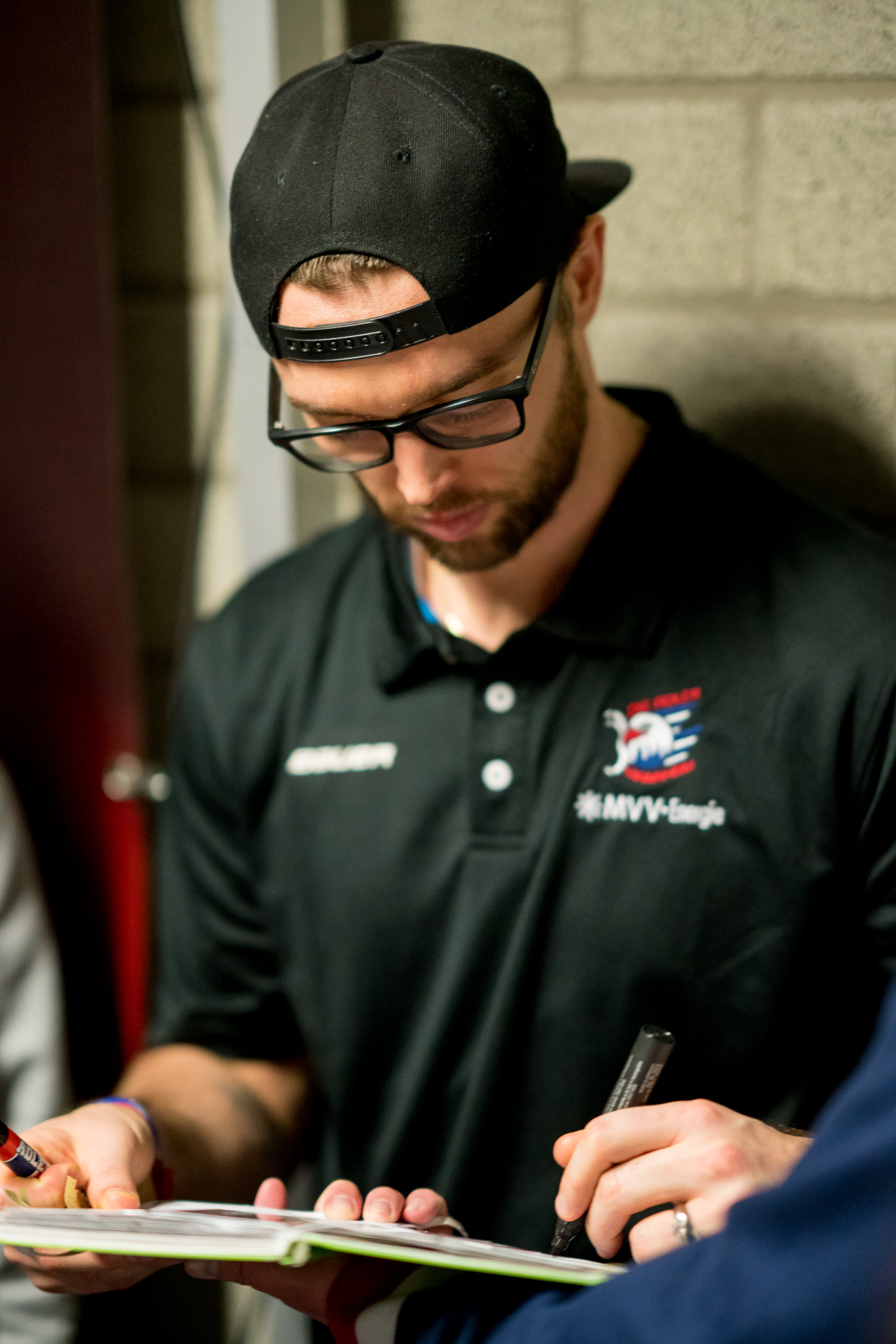 Drew MacIntyre, Saisonabschluß-"Feier" 24.3.2017 SAP-Arena